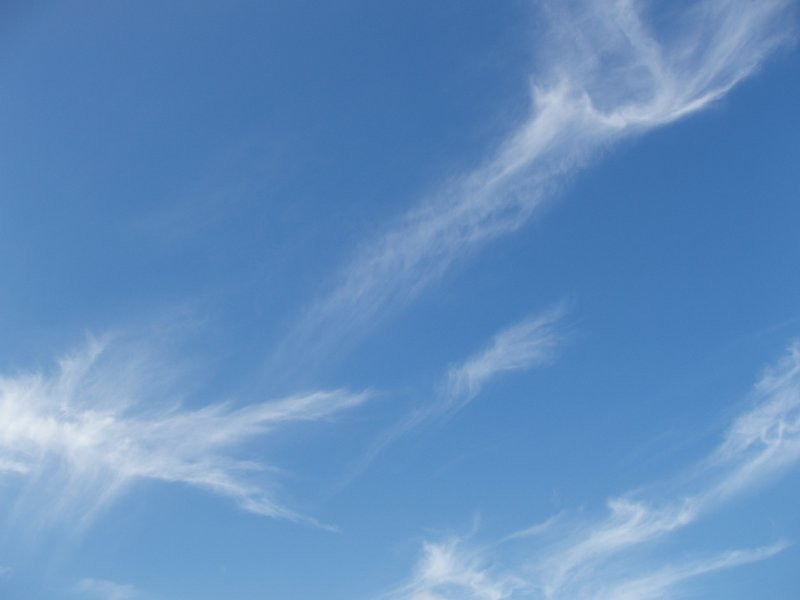 Cielo y nubecillas.